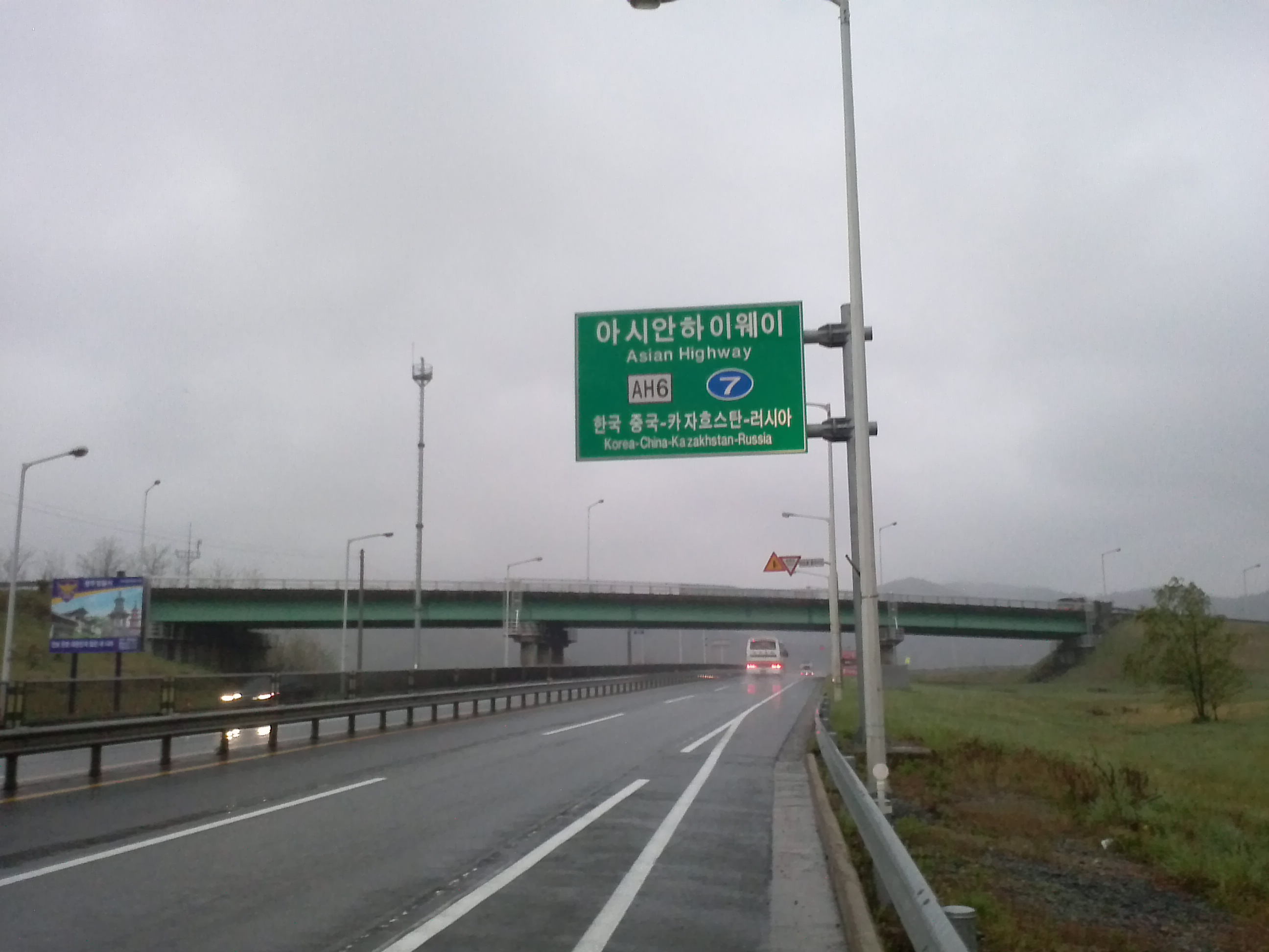 AH6 표지판, 7번국도 강동분기점 인근